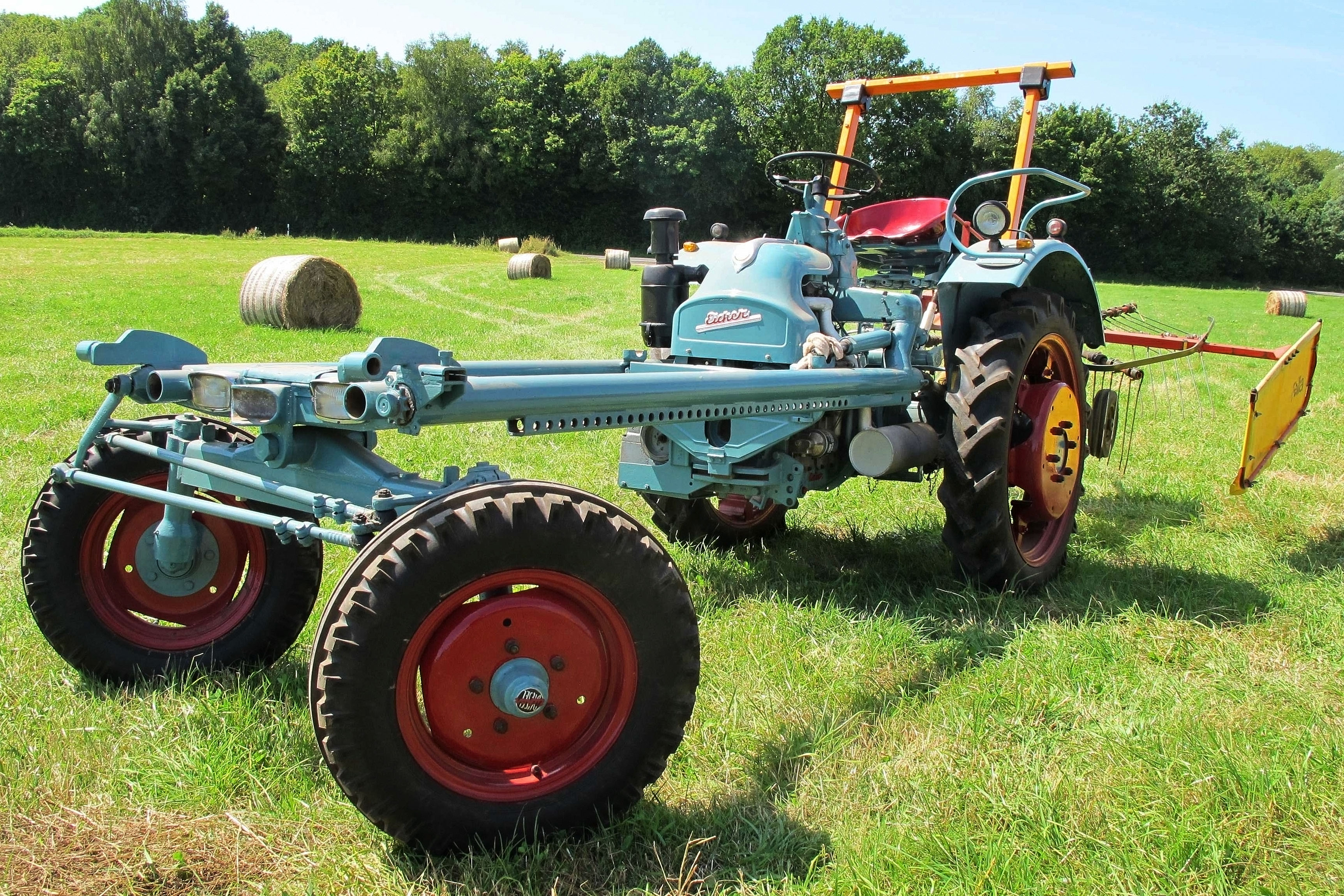 Eicher G25, Typ 3802